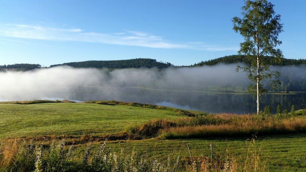 Getingstasjön i dimma.